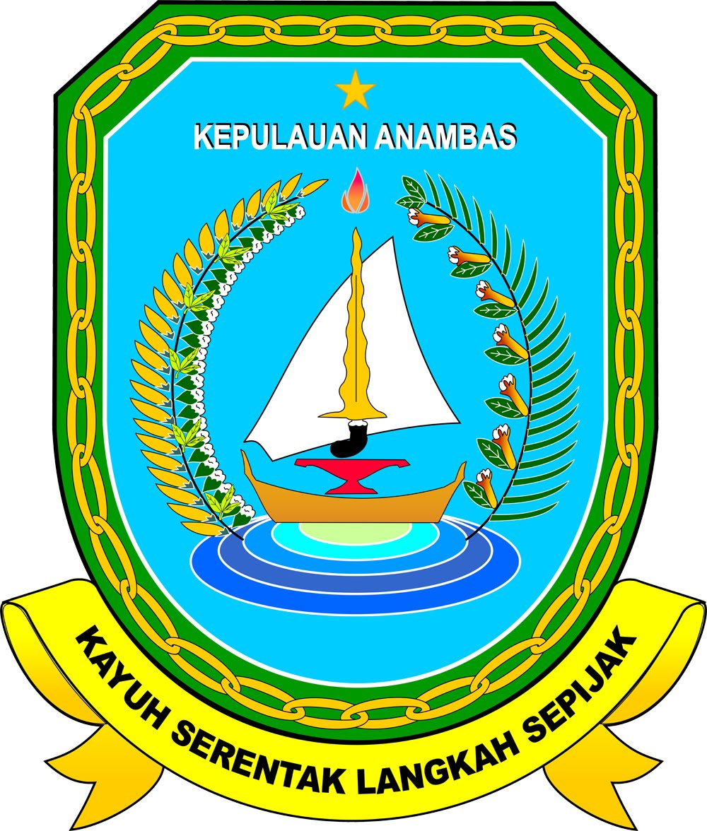 Lambang Kabupaten Kepulauan Anambas , Provinsi Kepulauan Riau